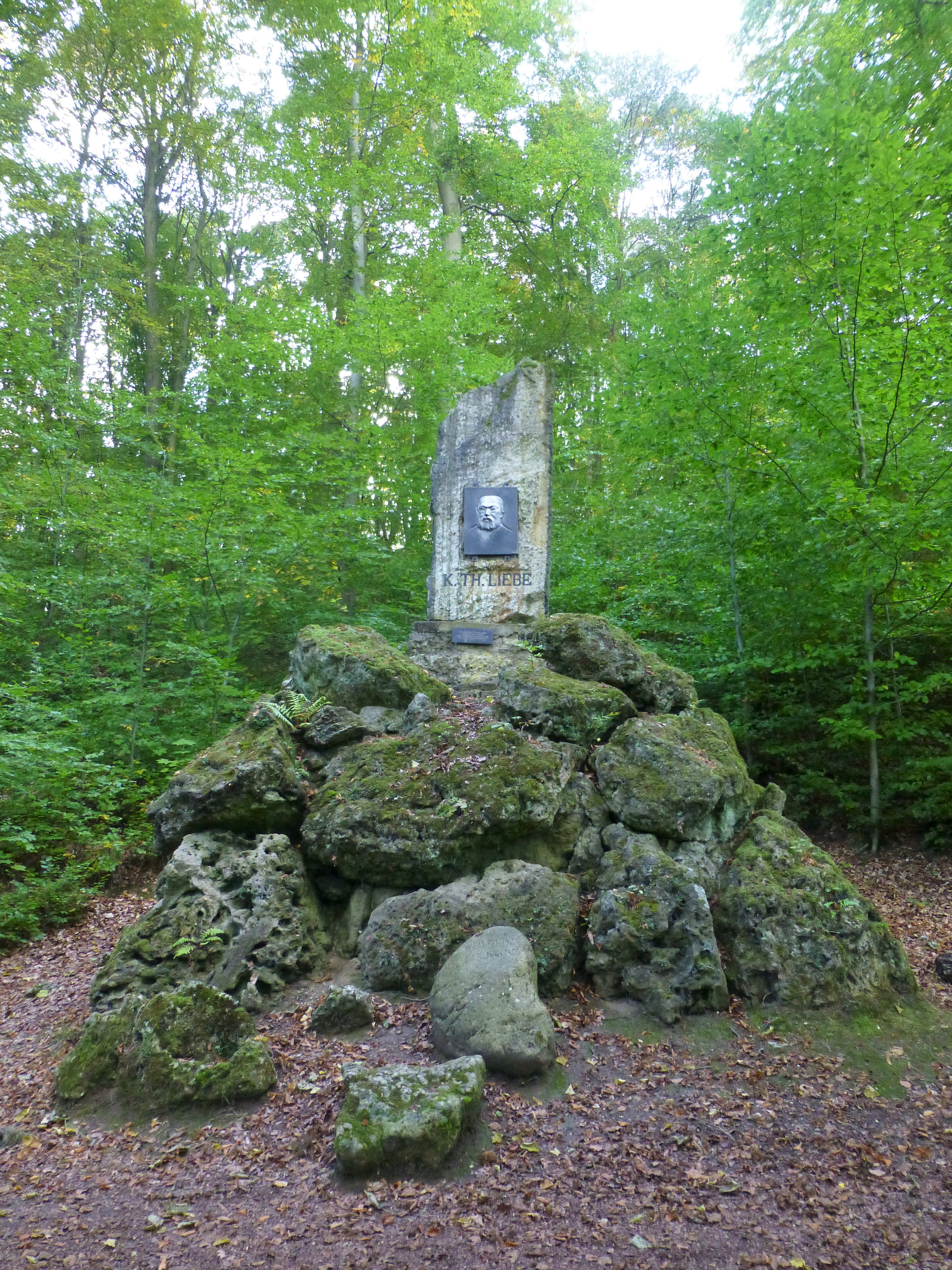 Denkmal für den Hofrat Prof. Karl Theodor Liebe (1828-1894) im Stadtwald Gera